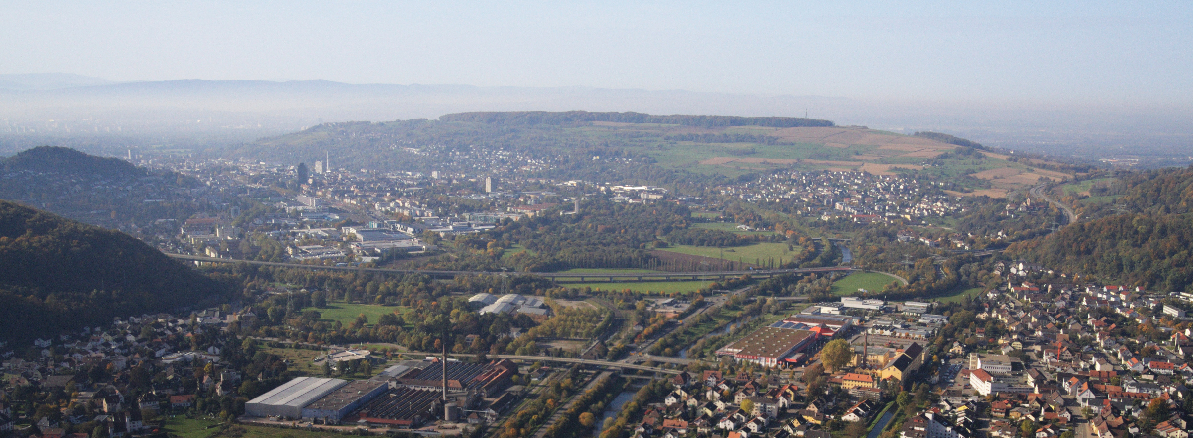 Luftbild vom Tüllinger Berg aus nördlicher Richtung